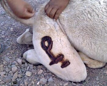 وسم الكفة